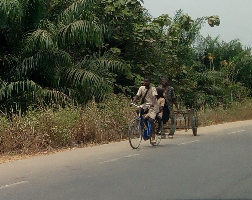 Élèves vus sur leur vélo du retour de l'école sur l'axe Côme Grand Popo This is an image with the theme "Africa on the Move or Transport" from: Benin